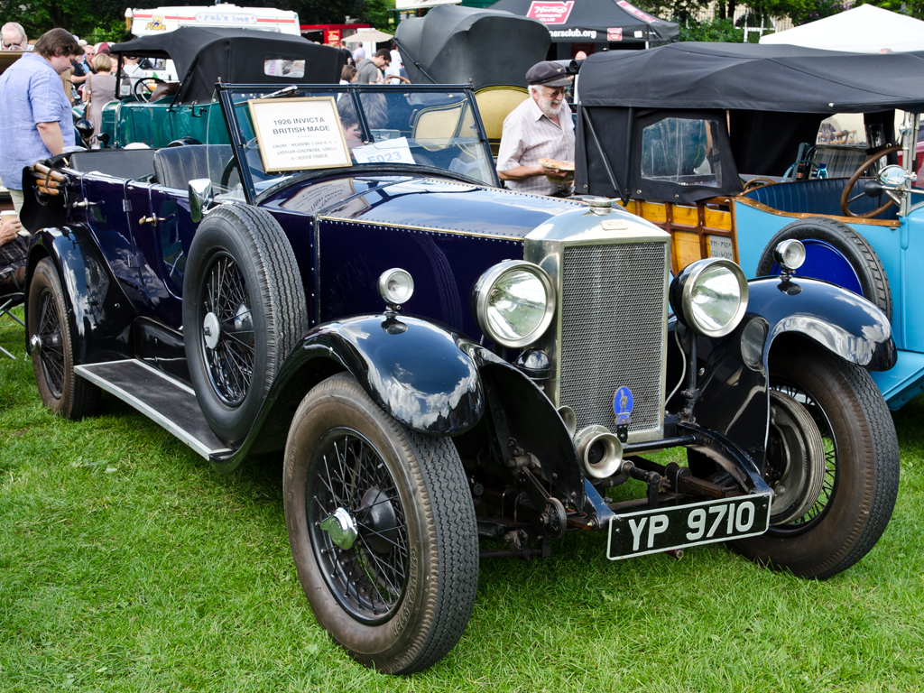 Invicta 3 Litre 4-door tourer 1926 Hebden Bridge Vintage Weekend 05/08/2012